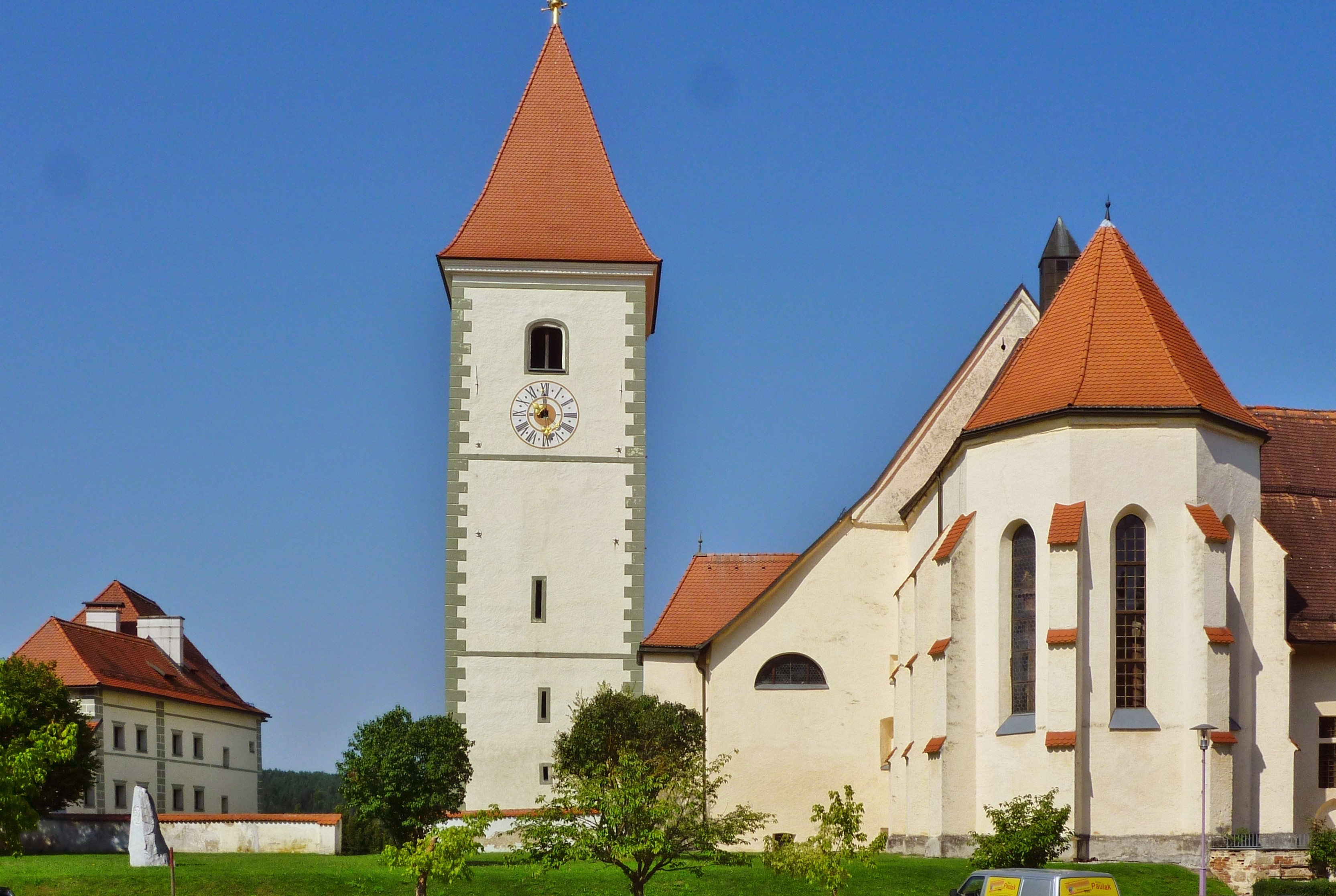 1376 Umbau der romanischen Kirche in eine gotische, Campanile, err. im 15.Jh., ganz links - südl. Torbau